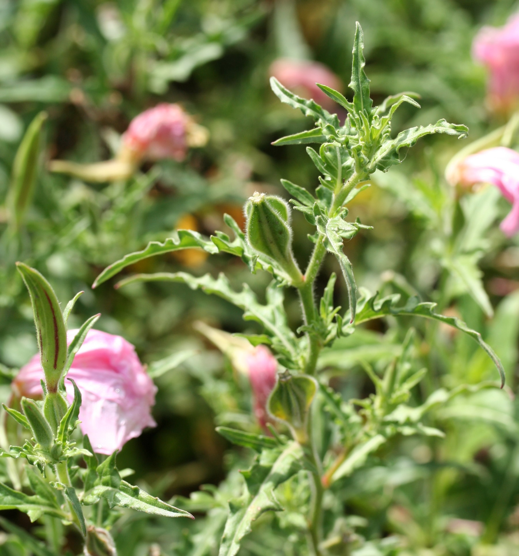 Oenothera tetraptera im Botanischen Garten Dresden